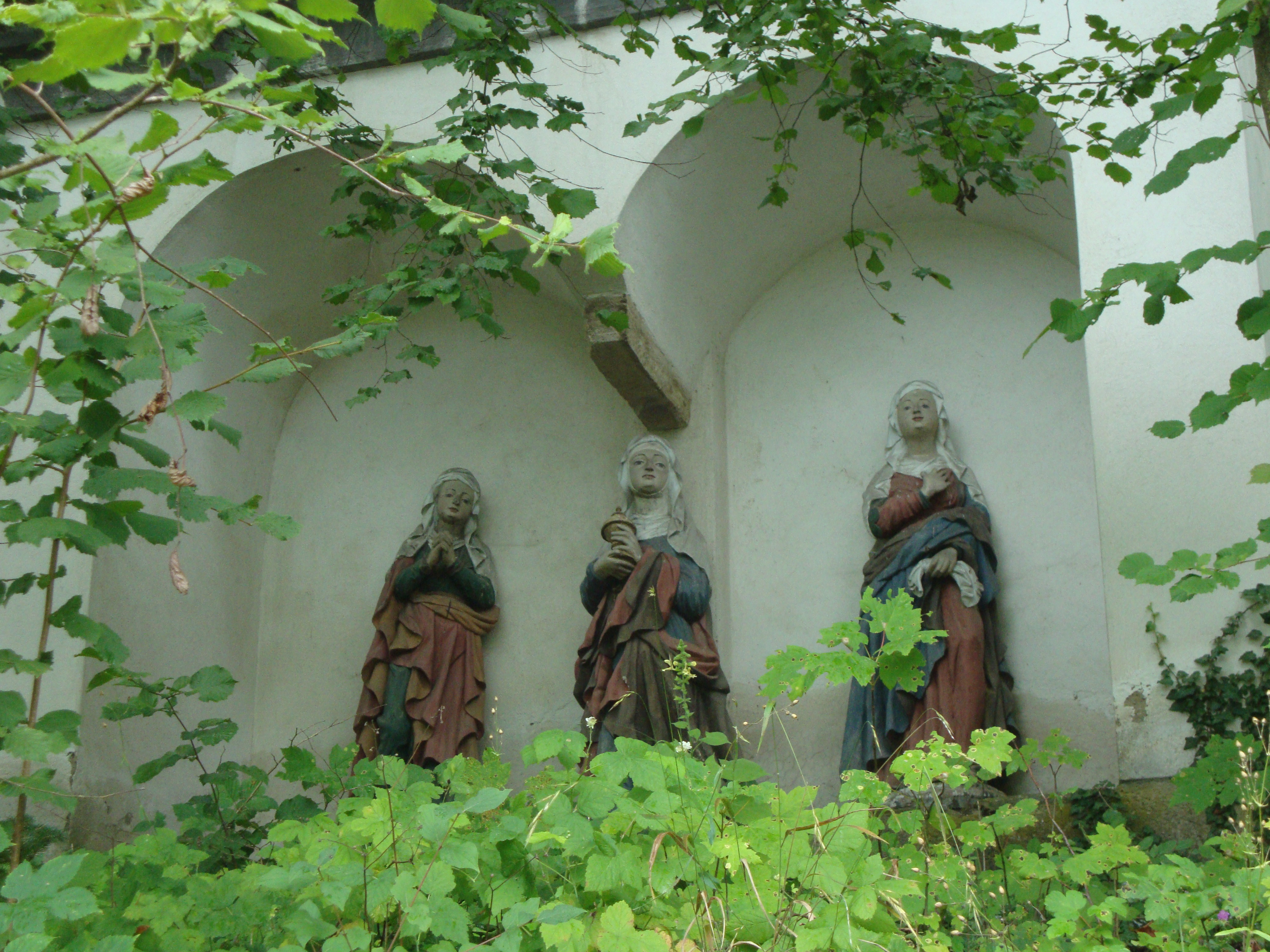 Heiliger Berg Karmel mit Kirche, Kloster, Kreuzweg und Hl.-Grab-Kapelle